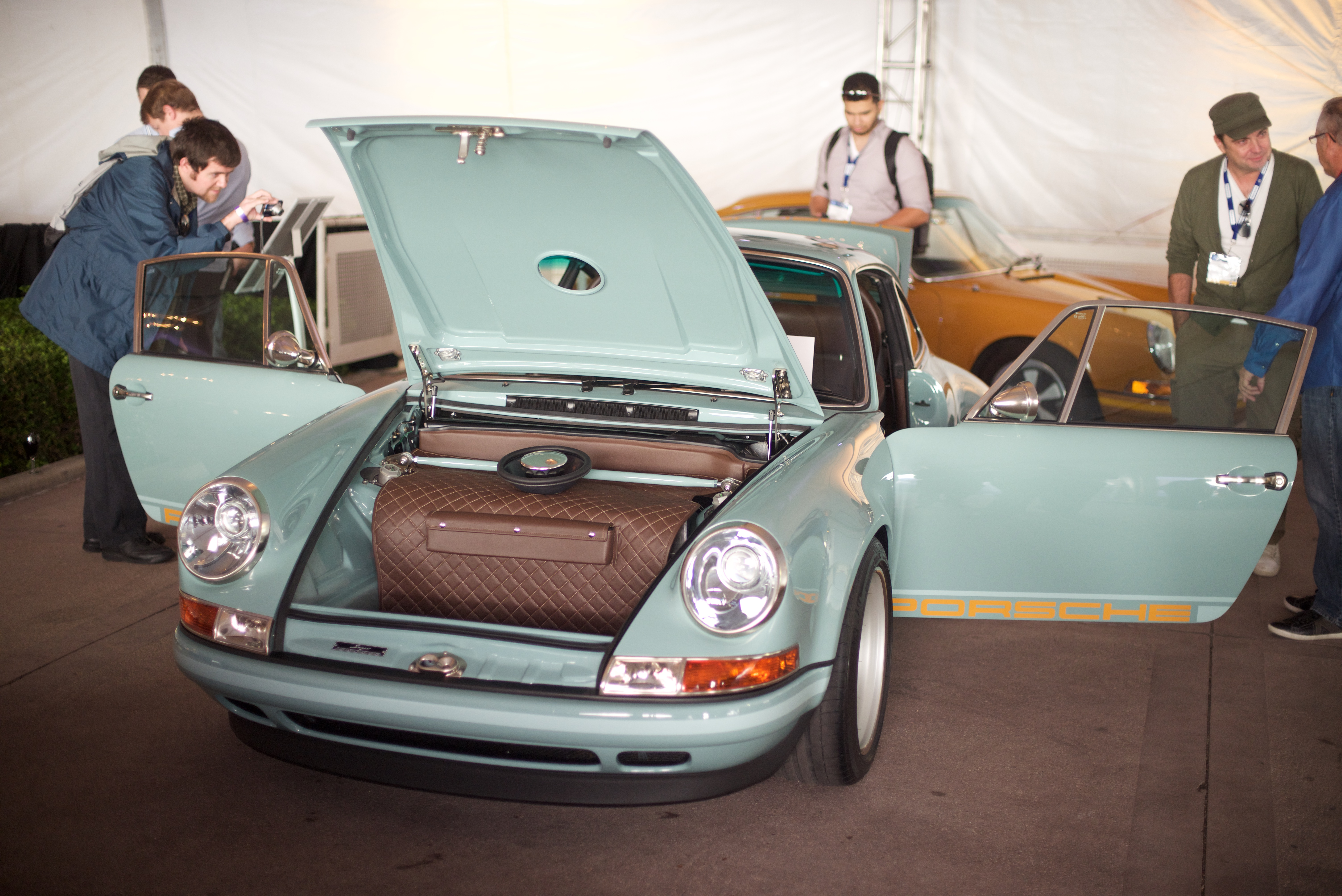 SLY_5601